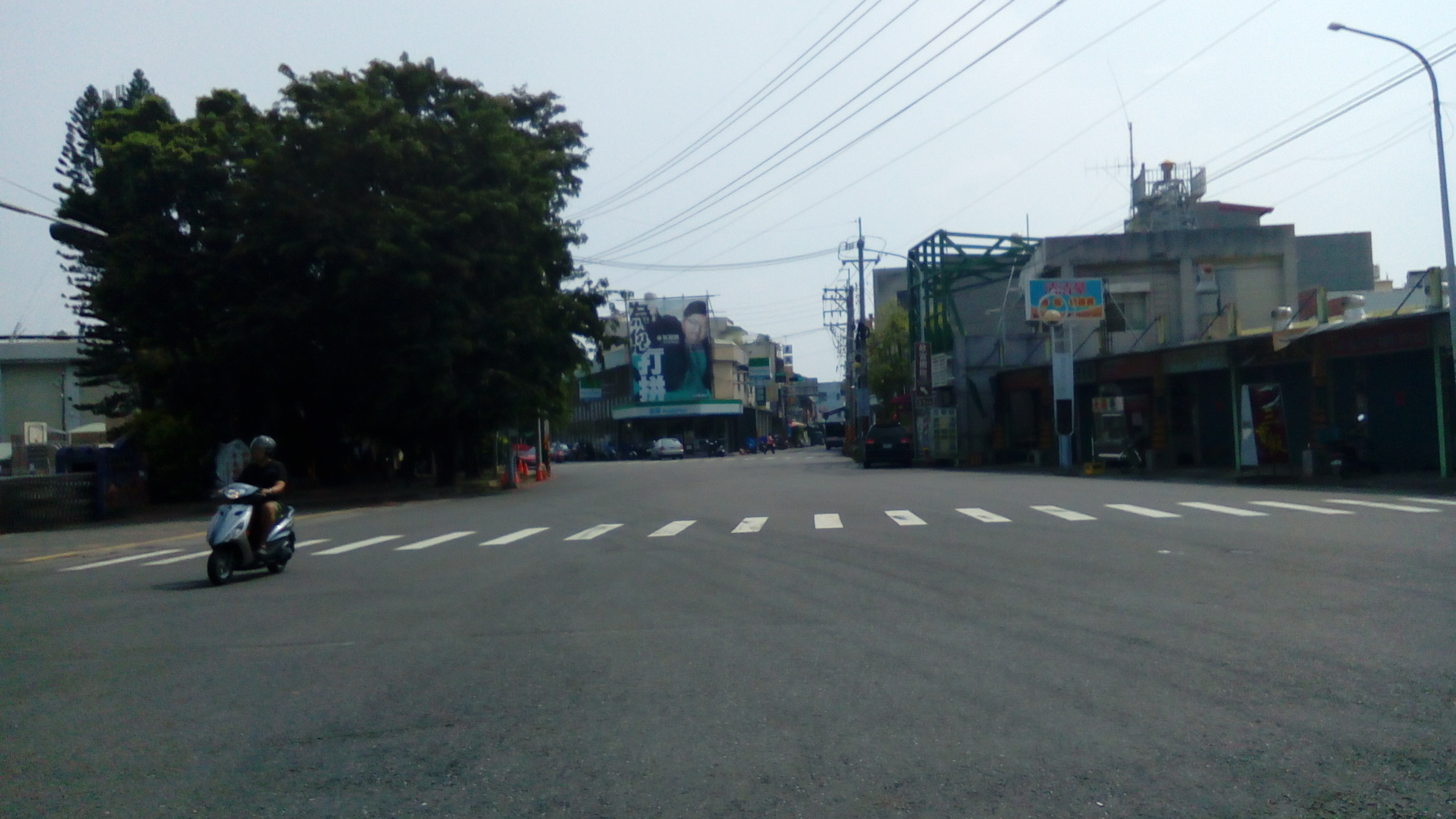 蒜頭村大路口(前方為蔡易餘競選看板)